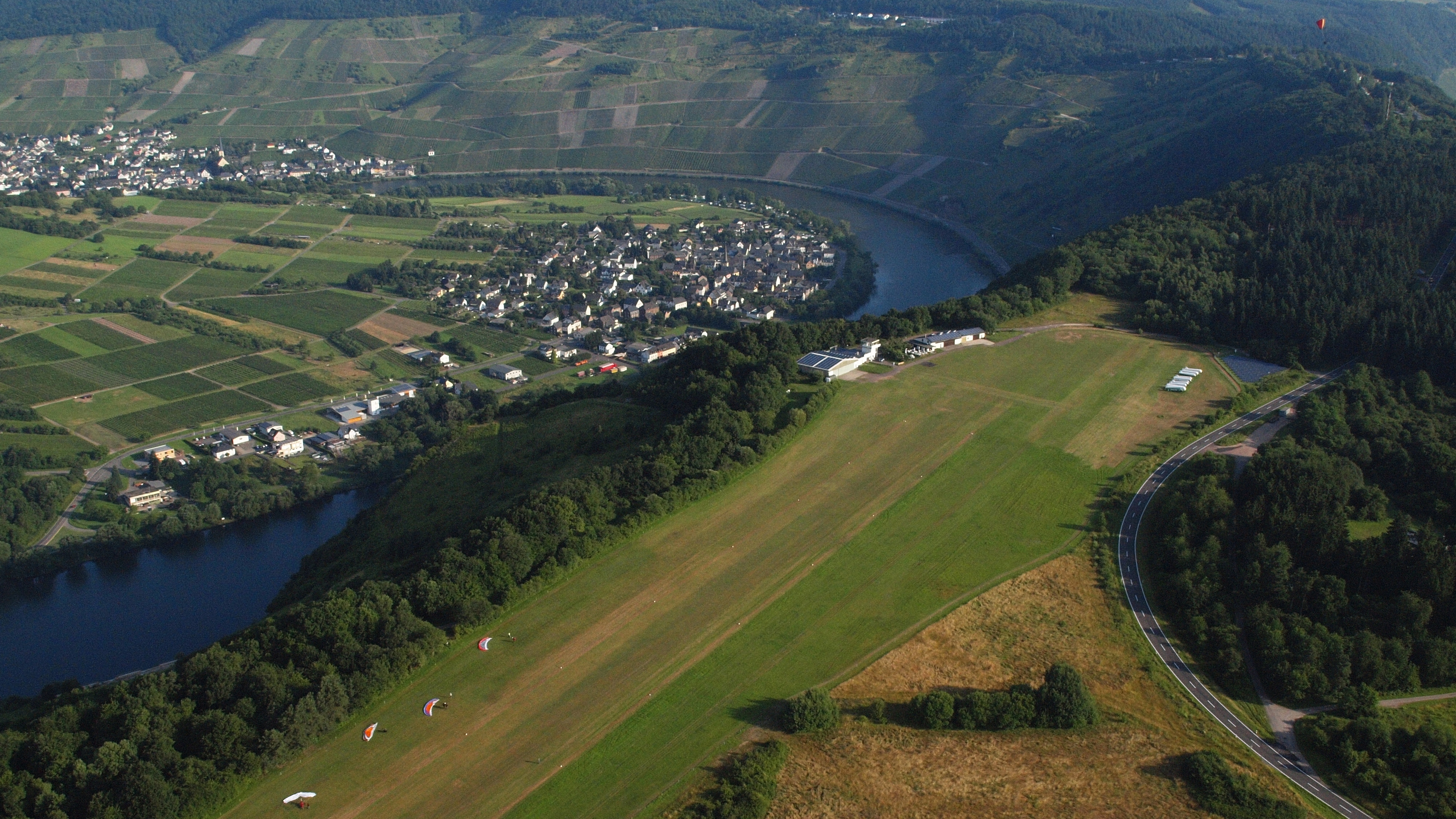 Traben-Trarbach, Flugplatz: Luftaufnahme